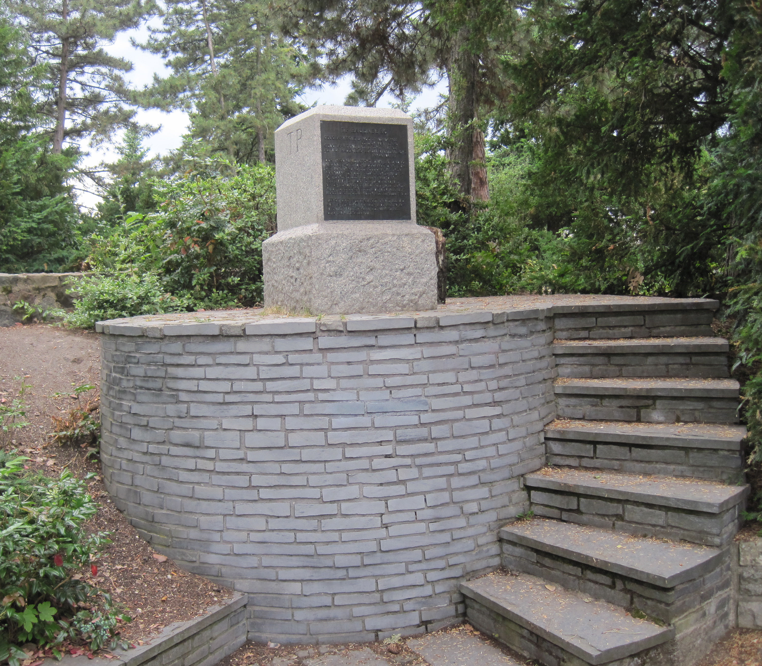 Ansicht des Denkmals TP Rauenberg in Berlin-Tempelhof